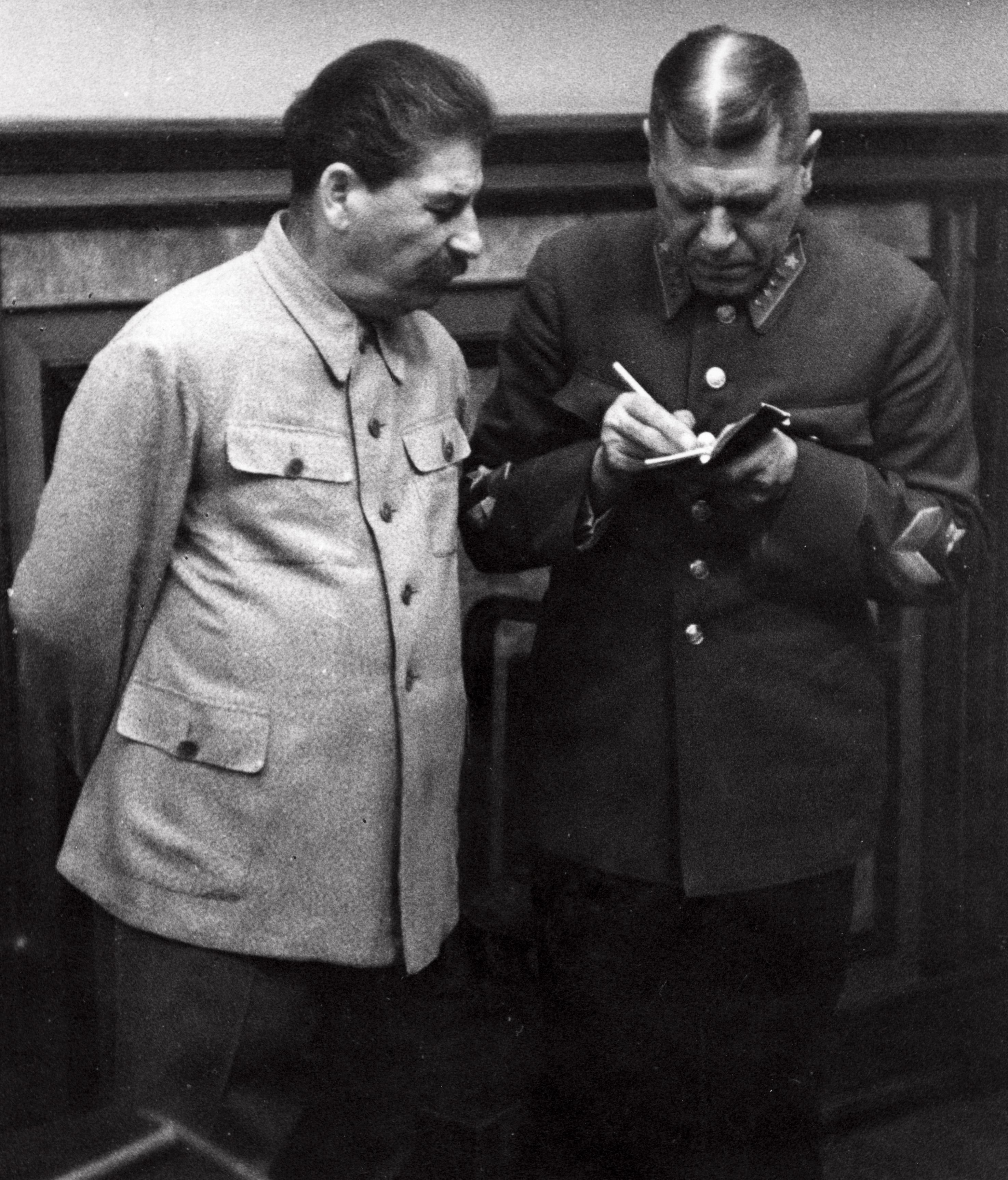 Verdragen. Stalin geeft de Russische Chef van Staf instructies t.g.v. de sluiting van het Russisch-Duitse Grens- en Vriendschapsverdrag, dat werd gesloten in het Kremlin op 7 oktober 1939. 1939. Rusland.